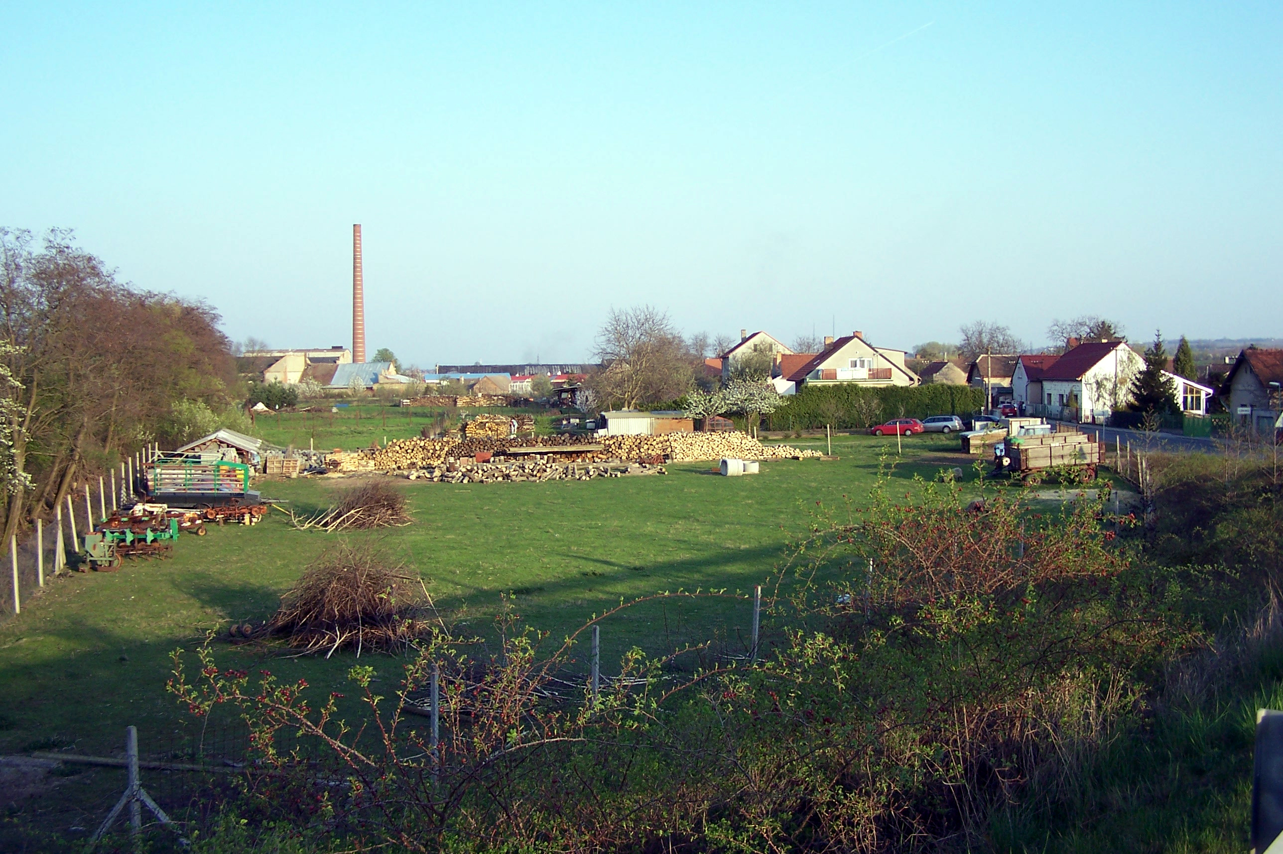 Cerhenice – pohled na městys z nadjezdu nad tratí (směr od Ratenic).